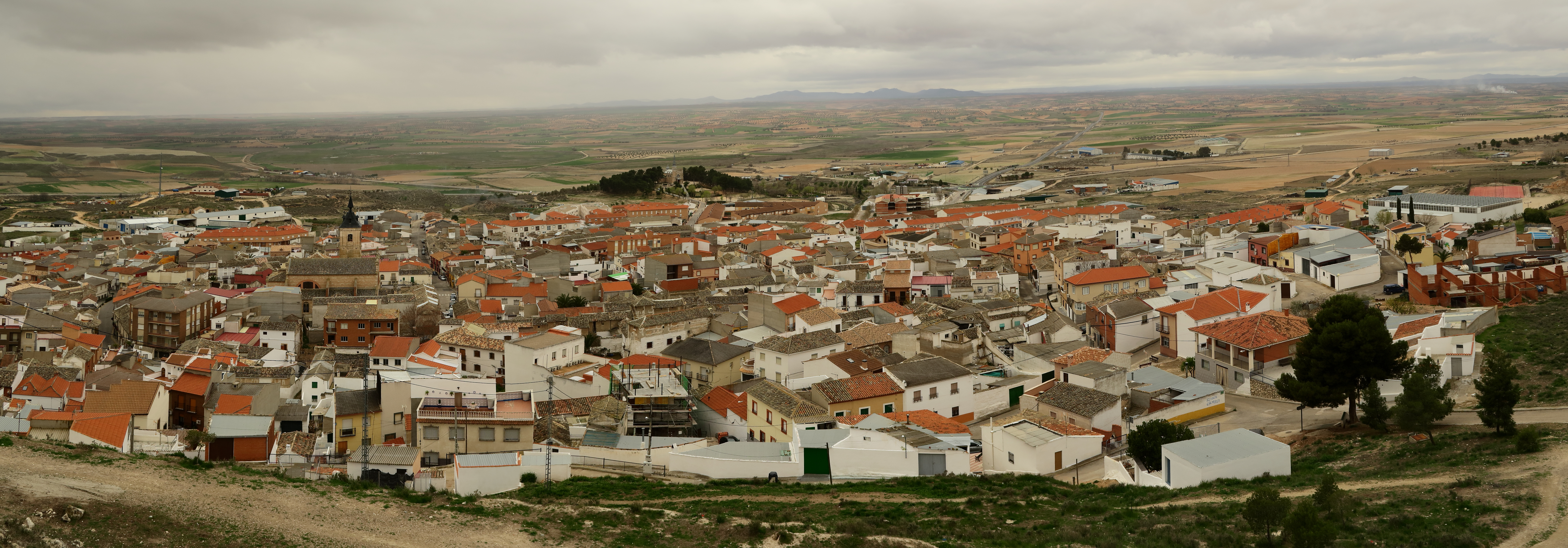 Huerta de Valdecarábanos, panorámica desde las ruinas del castillo.